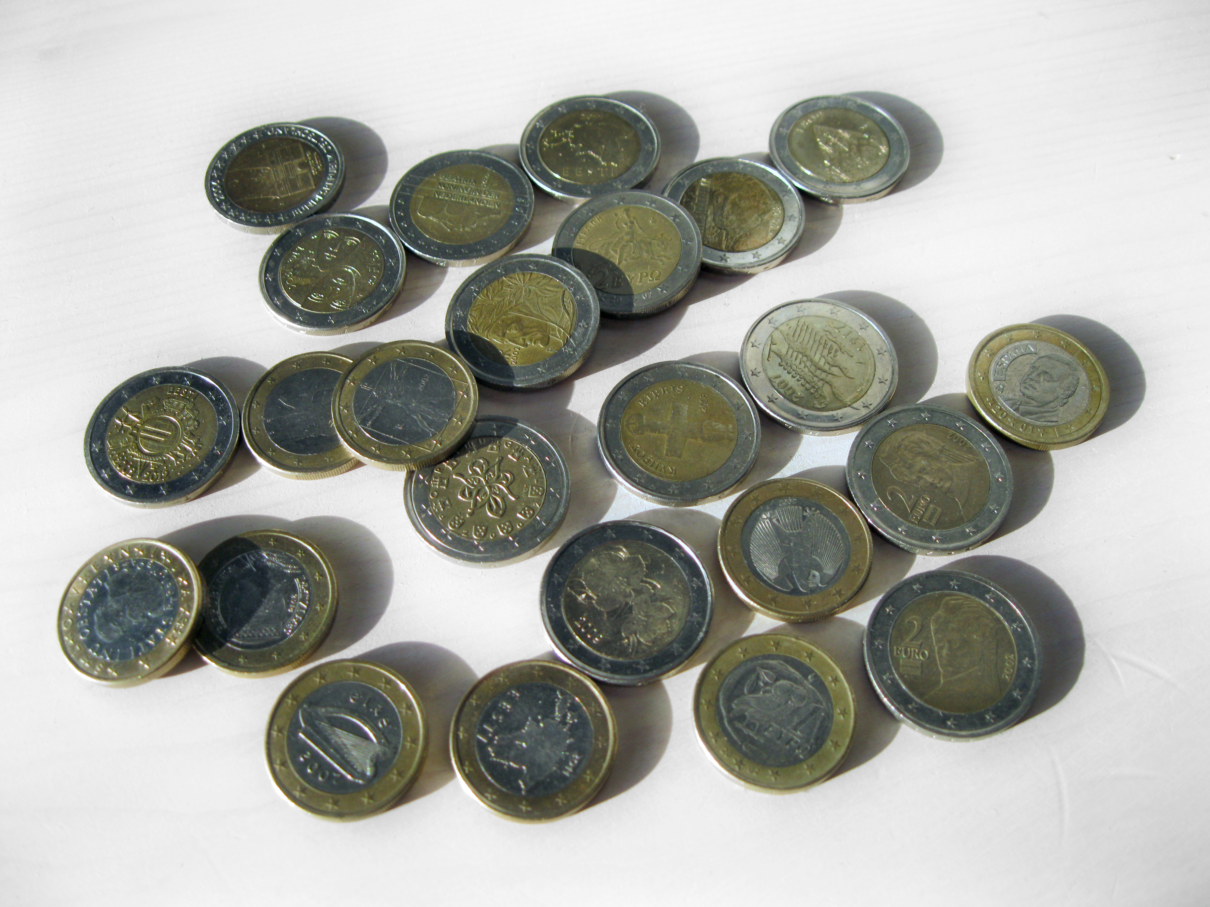 Erilaisia yhden- ja kahden euron kolikoita.